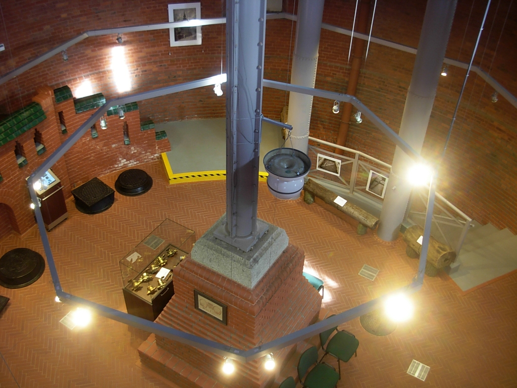 Muzeum Wodociągów w Bydgoszczy